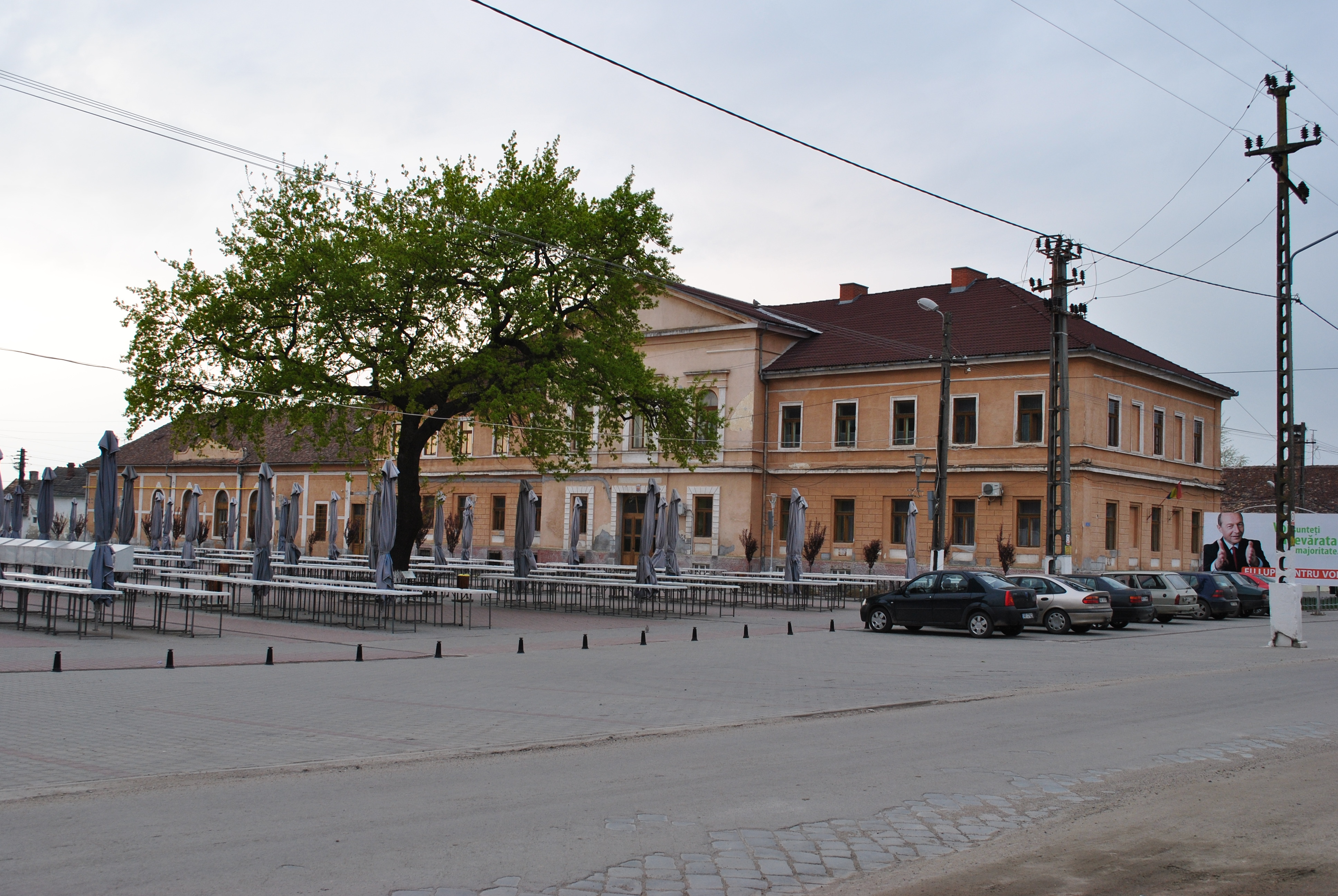 Ansamblul urban Pecica, 1850 - 1900